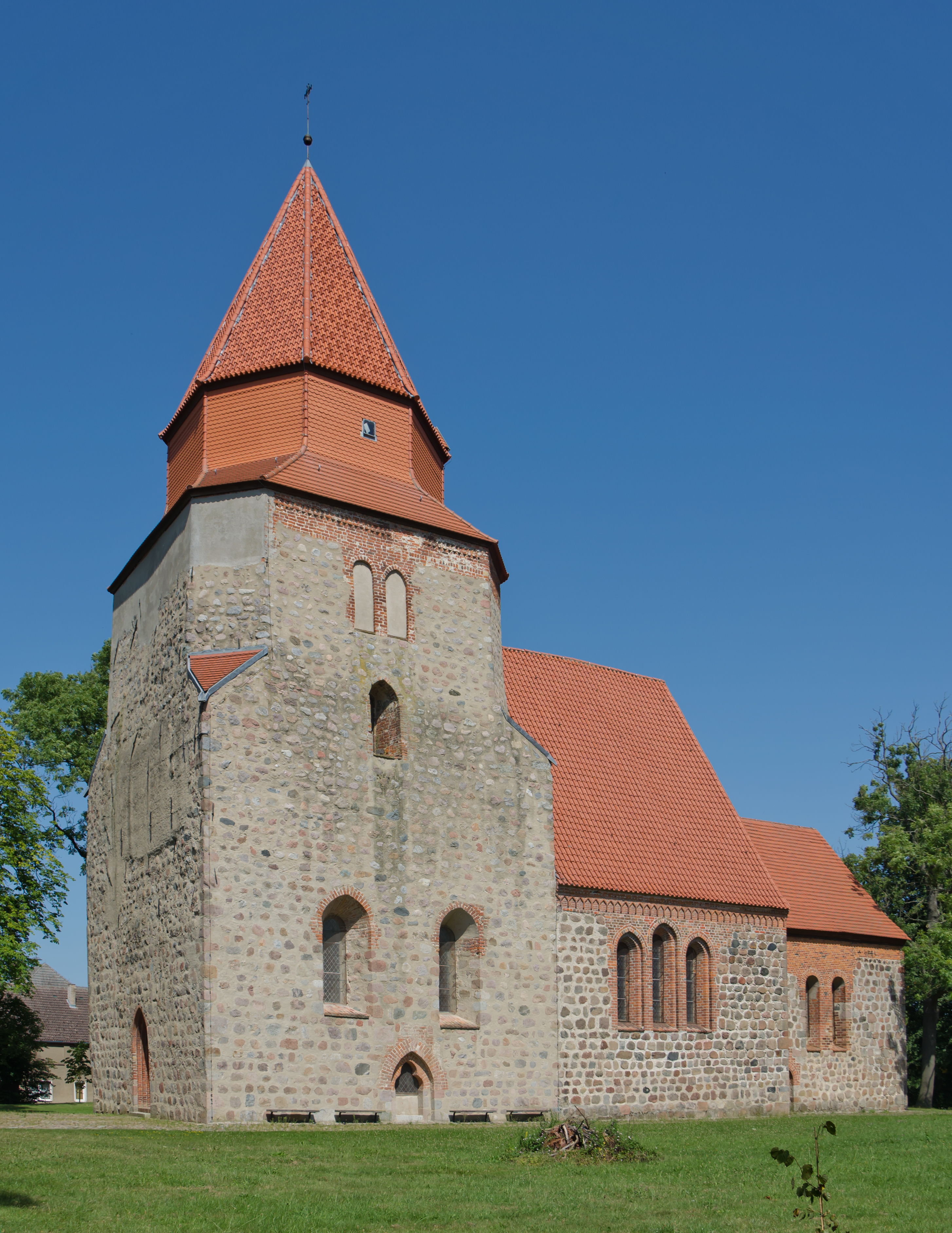 Kavelstorf - Kirche